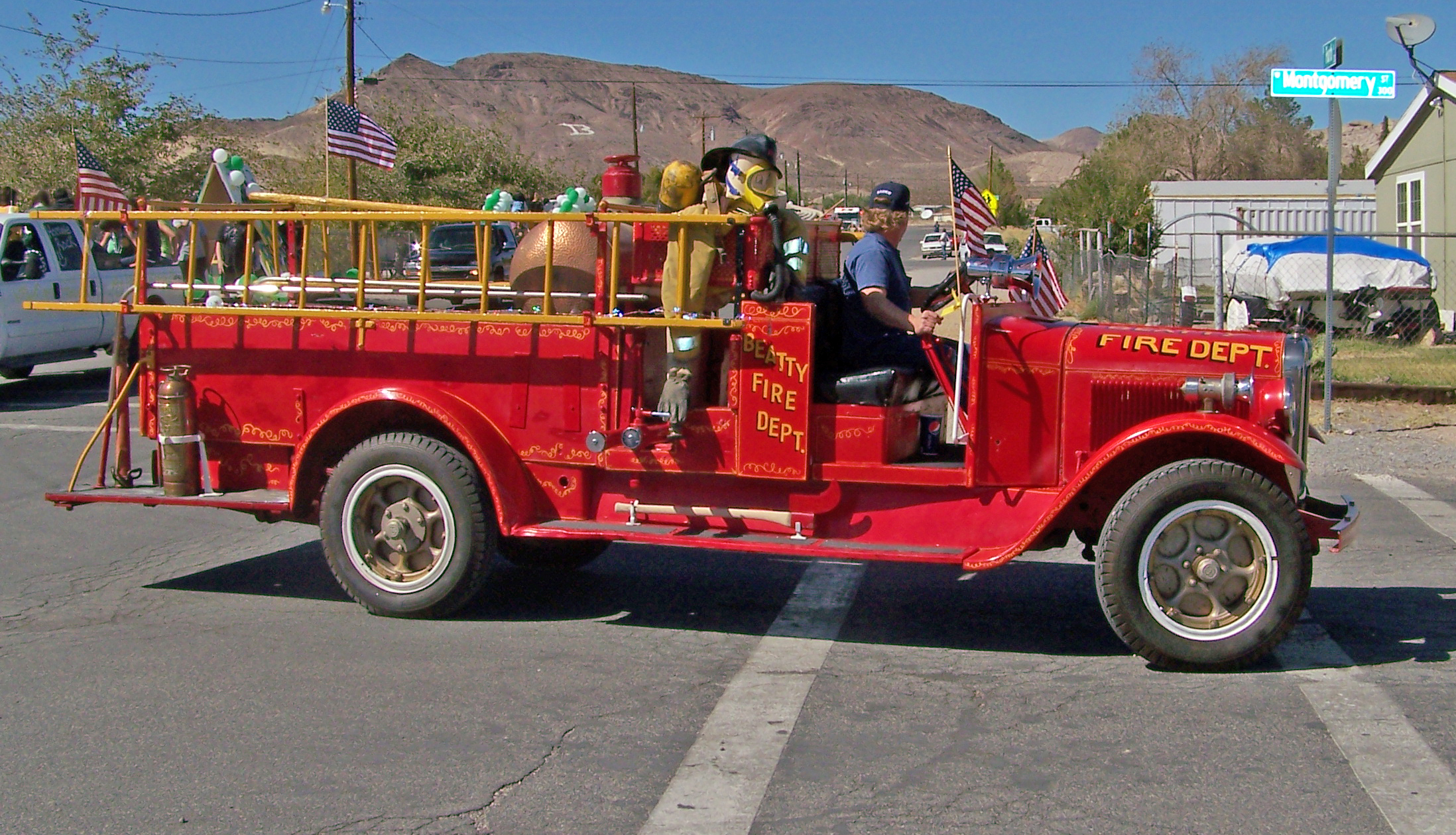 Beatty FD Antique Fire Truck